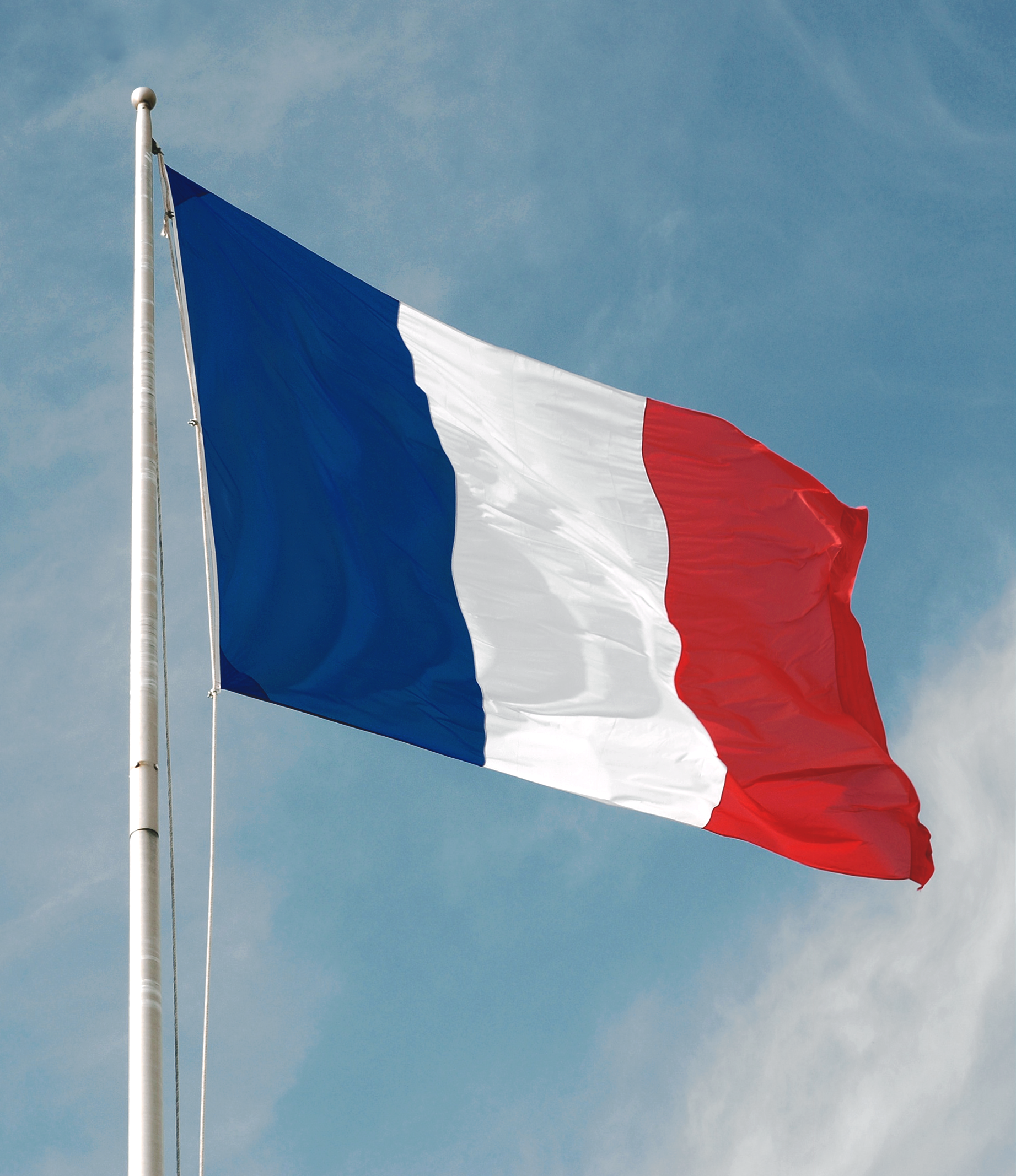 Photographie du drapeau français flottant au vent.